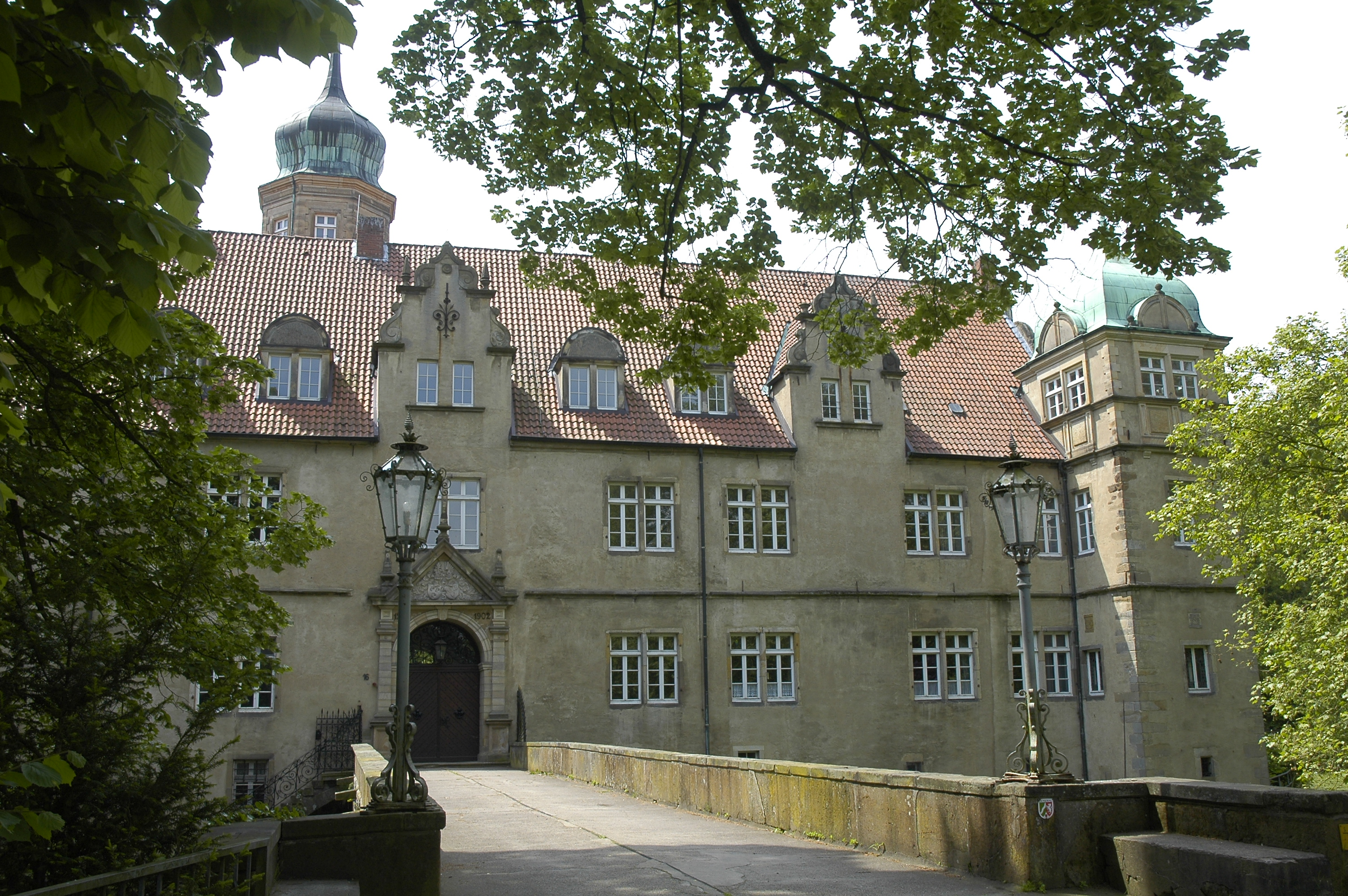 Schloss Ulenburg, Mennighüffen, Ostwestfalen